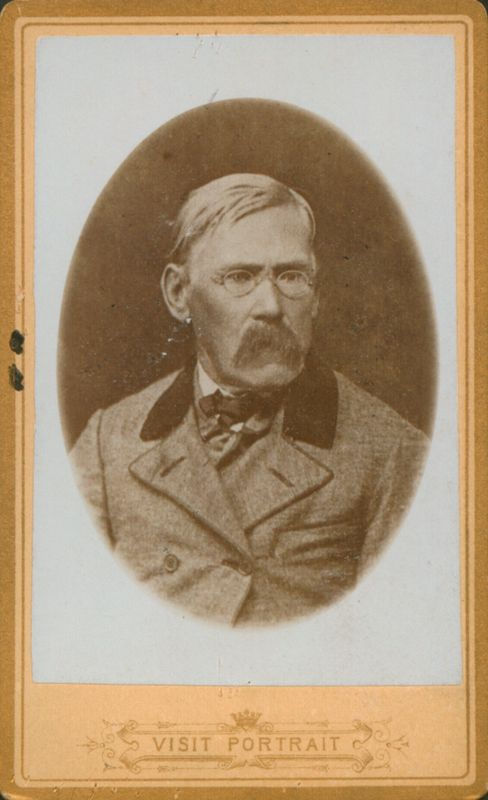 Aleksandras Fromas-Gužutis (1822 m. gruodžio 12 d. Raseiniai – 1900 m. rugpjūčio 21 d. Gongailiškiai, Girkalnio valsčius; palaidotas Girkalnyje) – Lietuvos rašytojas, vienas dramaturgijos lietuvių kalba pradininkų.